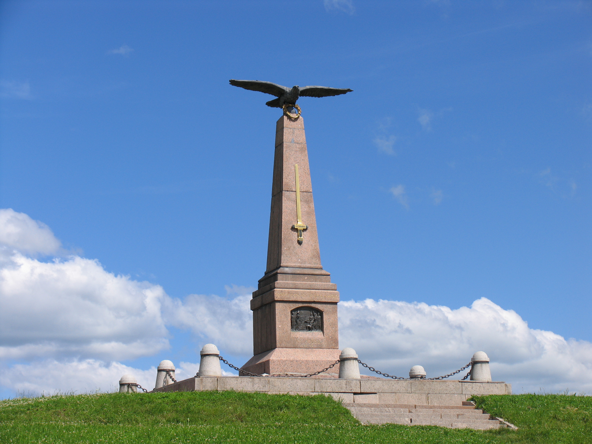 Памятник главнокомандующему русскими армиями М.И.Голенищеву-Кутузову.